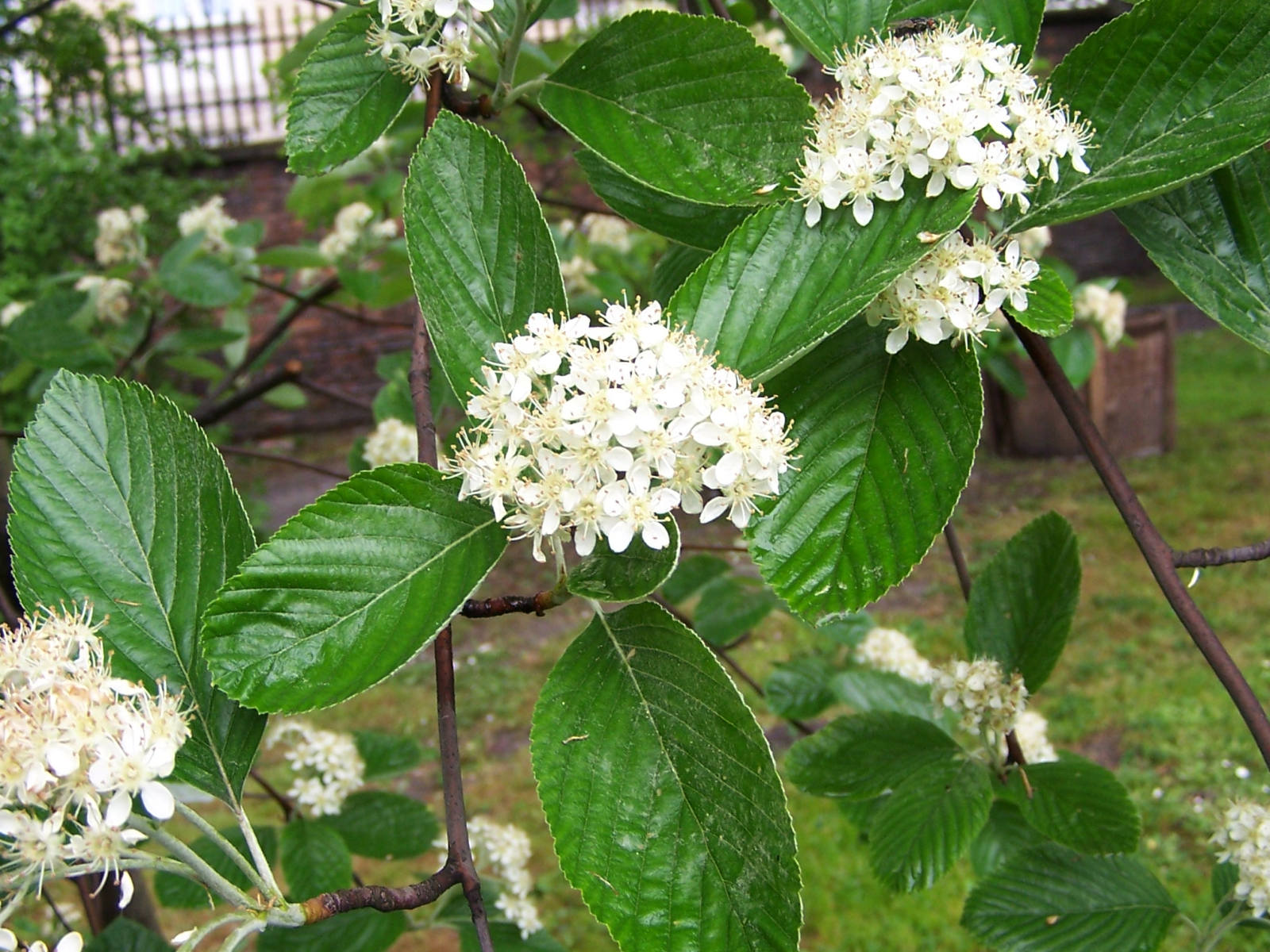 Sorbus aria (pl. jarząb mączny)